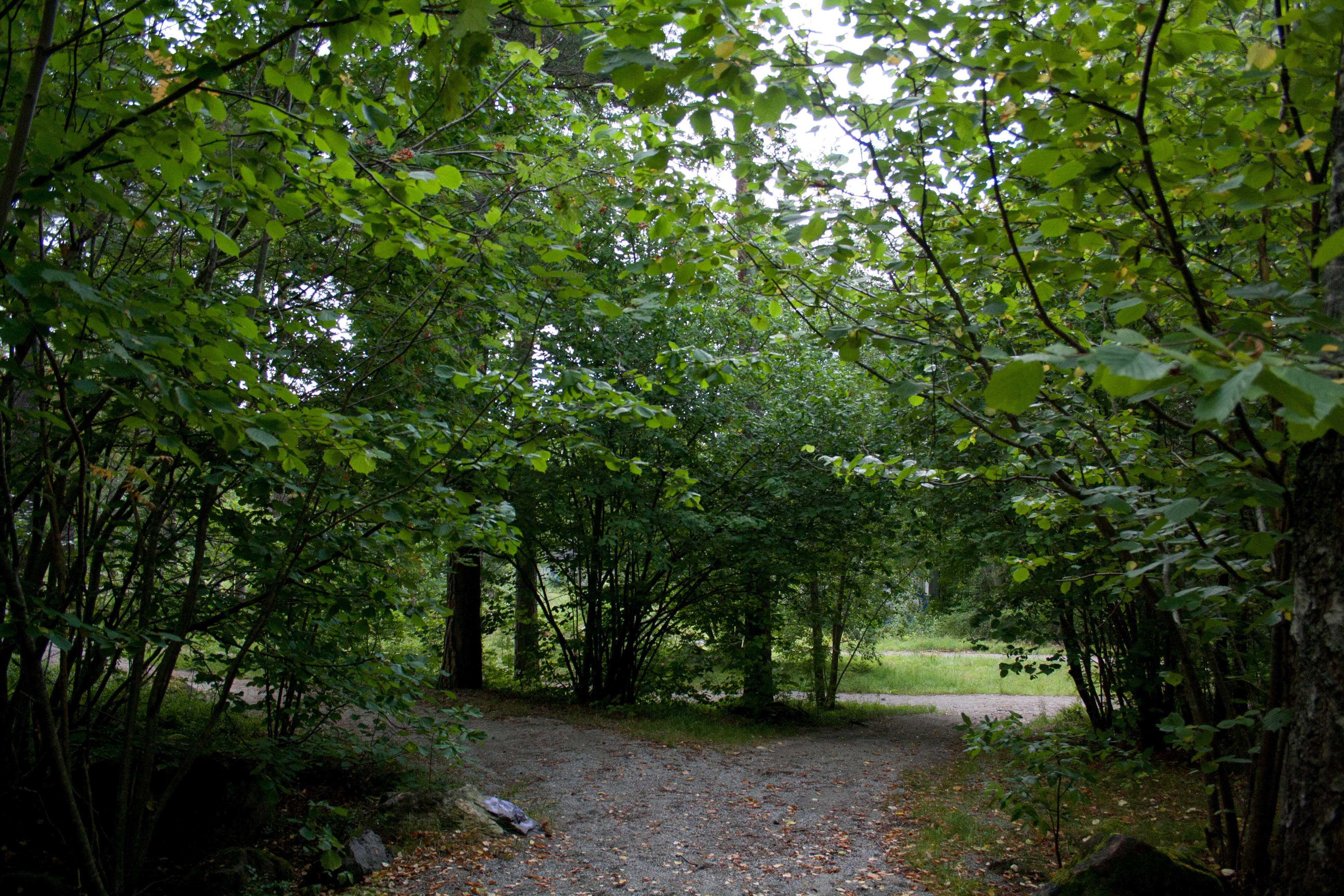 Bild på gren av stig mot södra samt västra entrén på Kyrkberget, Lindesbergs Kommun.